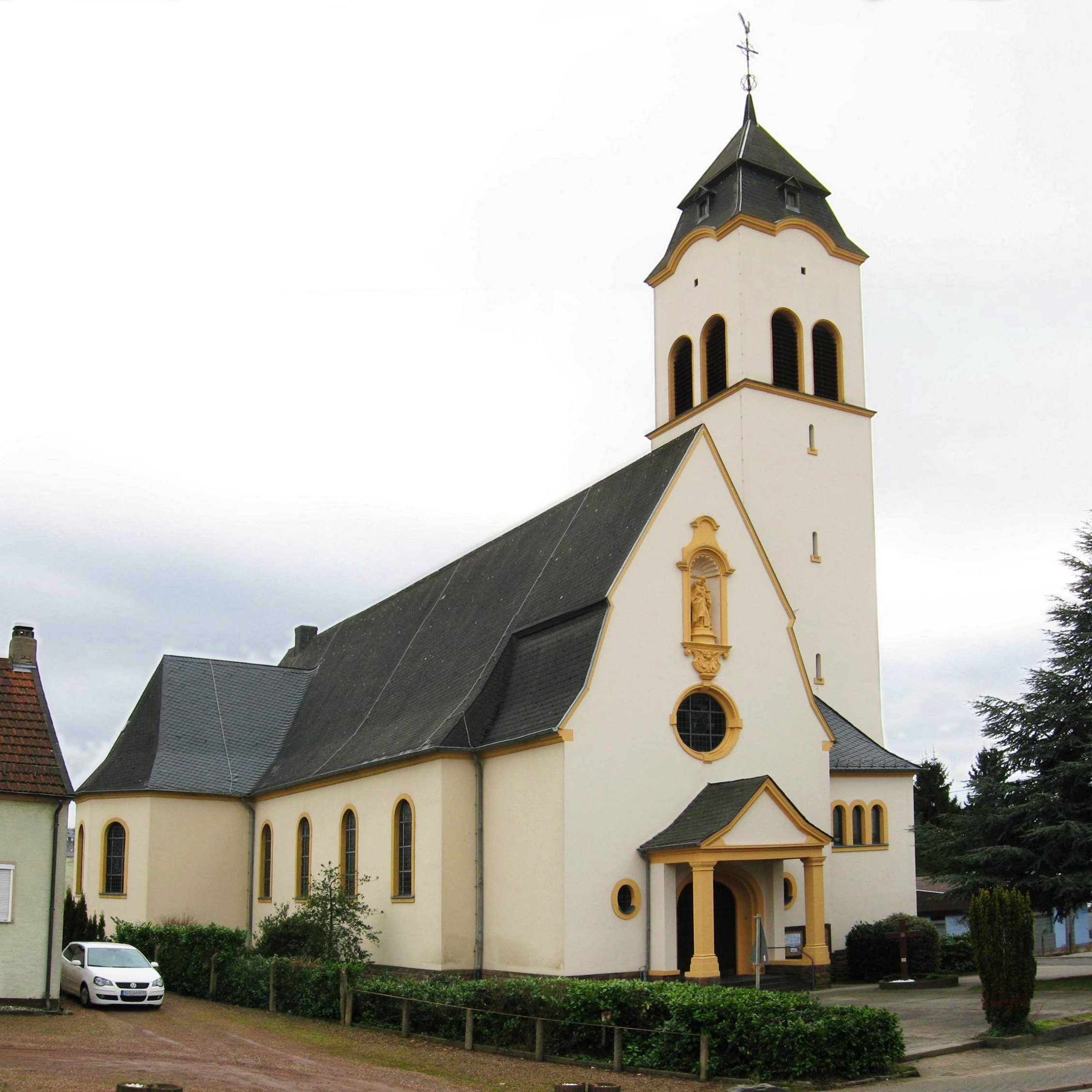 Katholische Kirche in Holzh